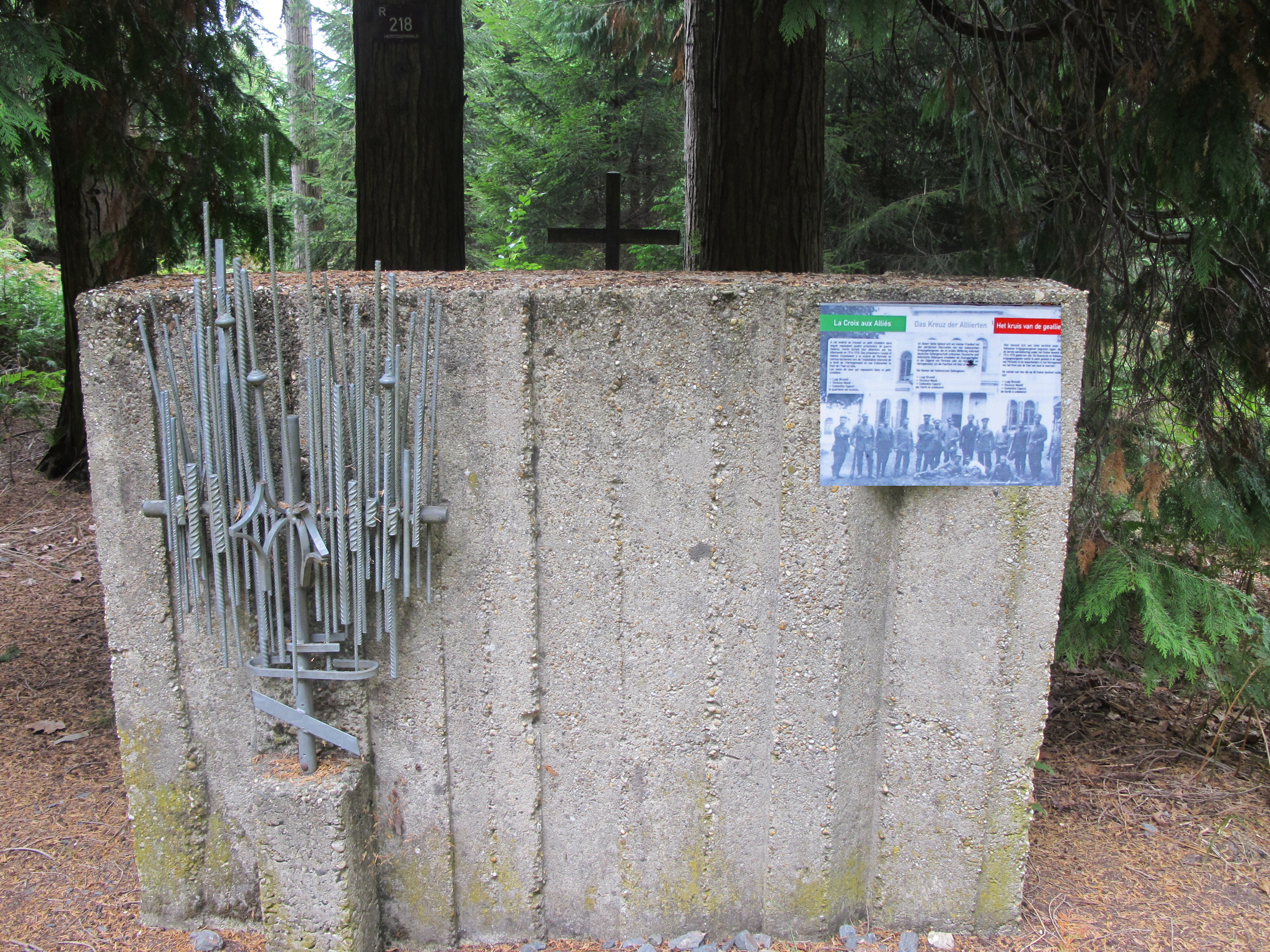 Mahnmal mit Stahlskulptur in Form einer Monstranz, für die verstorbenen russischen und italienischen Kriegsgefangenen im Hertogenwald. Im Hintergrund das "Kreuz der Alliierten".